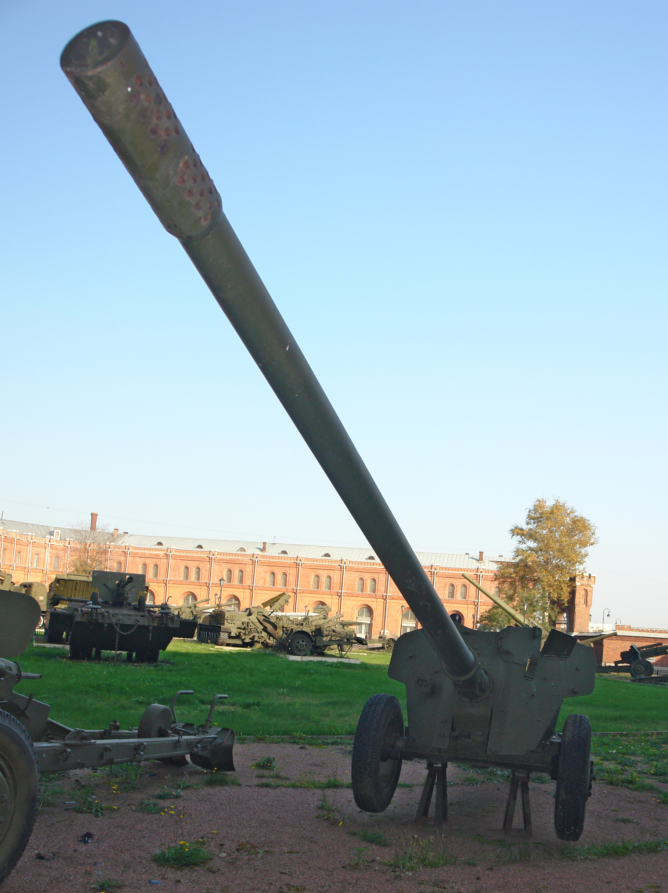 100-мм ПРОТИВОТАНКОВАЯ ПУШКА Т-12 (2А19) "РАПИРА" ПРИНЯТА НА ВООРУЖЕНИЕ В 1961 г. ГЛАВНЫЙ КОНСТРУКТОР Г.И.ЛУКЬЯНЧЕНКО. lbHOCTb, M: СТРЕЛЬБЫ-6000, ПРЯМОГО ВЫСТРЕЛ СКОРОСТРЕЛЬНОСТЬ - ДО 14 ВЫСТР/МИН. МАССА ОРУДИЯ-2800. РАСЧЕТ - 7 ЧЕЛОВЕК. Военно-исторический музей артиллерии, инженерных войск и войск связи, Санкт-Петербург.